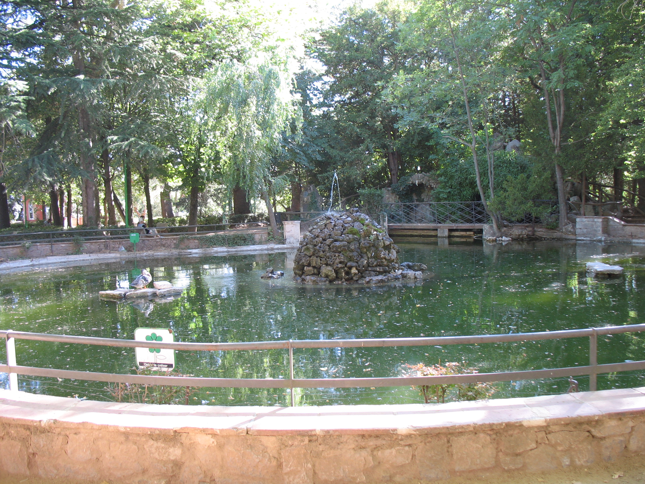 Aquesta foto mostra l'estanyol del parc municipal, situat a la part alta del mateix